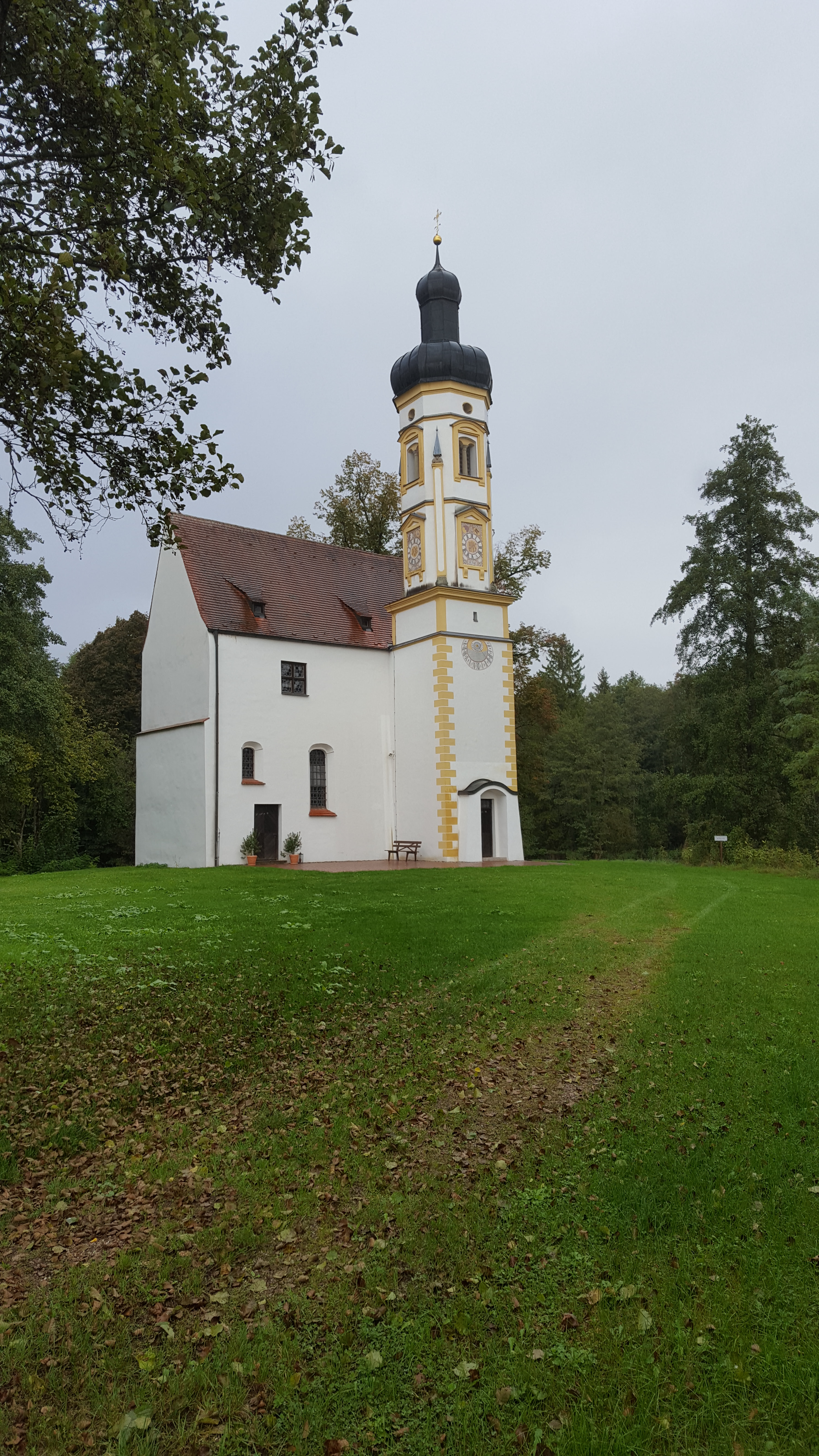 Außenansicht der Filialkirche und ehemaligen Schloßkapelle St. Nikolaus in Schenkenau, Waidhofen